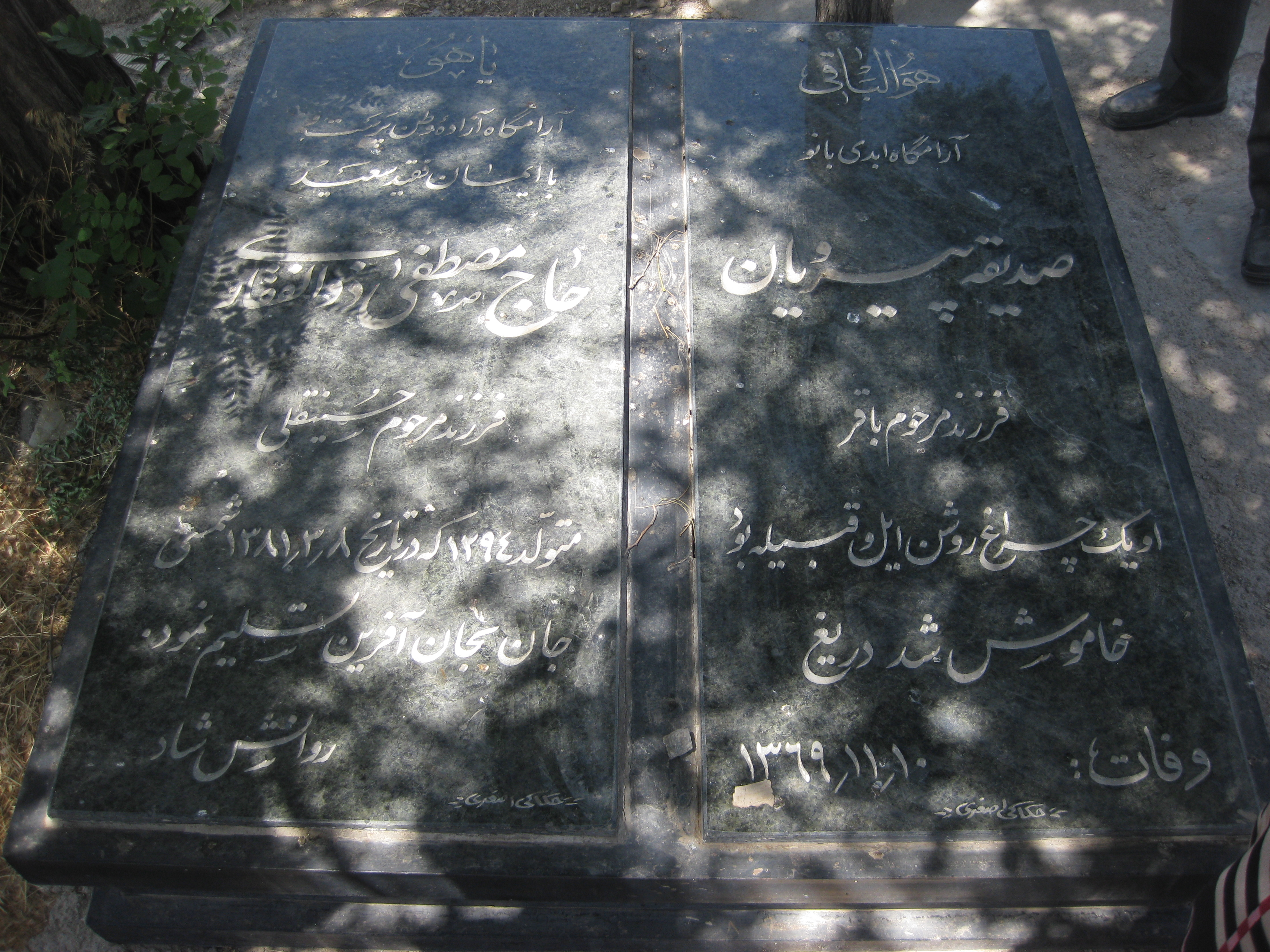 مزار مرحوم مصطفی خان ذوالفقاری و همسر مرحومشان بانو صدیقه پیرویان